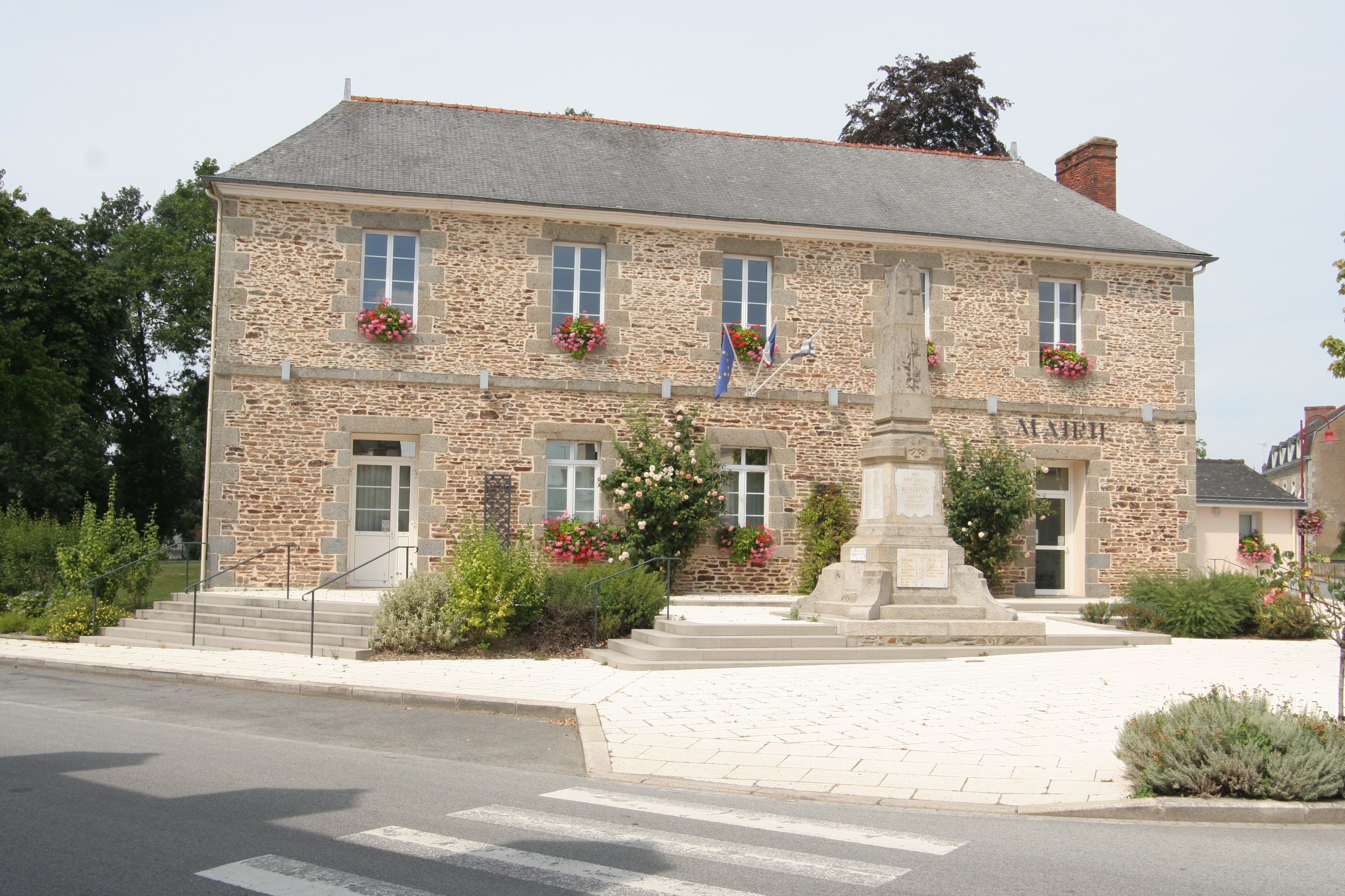 Mairie de Mohon.